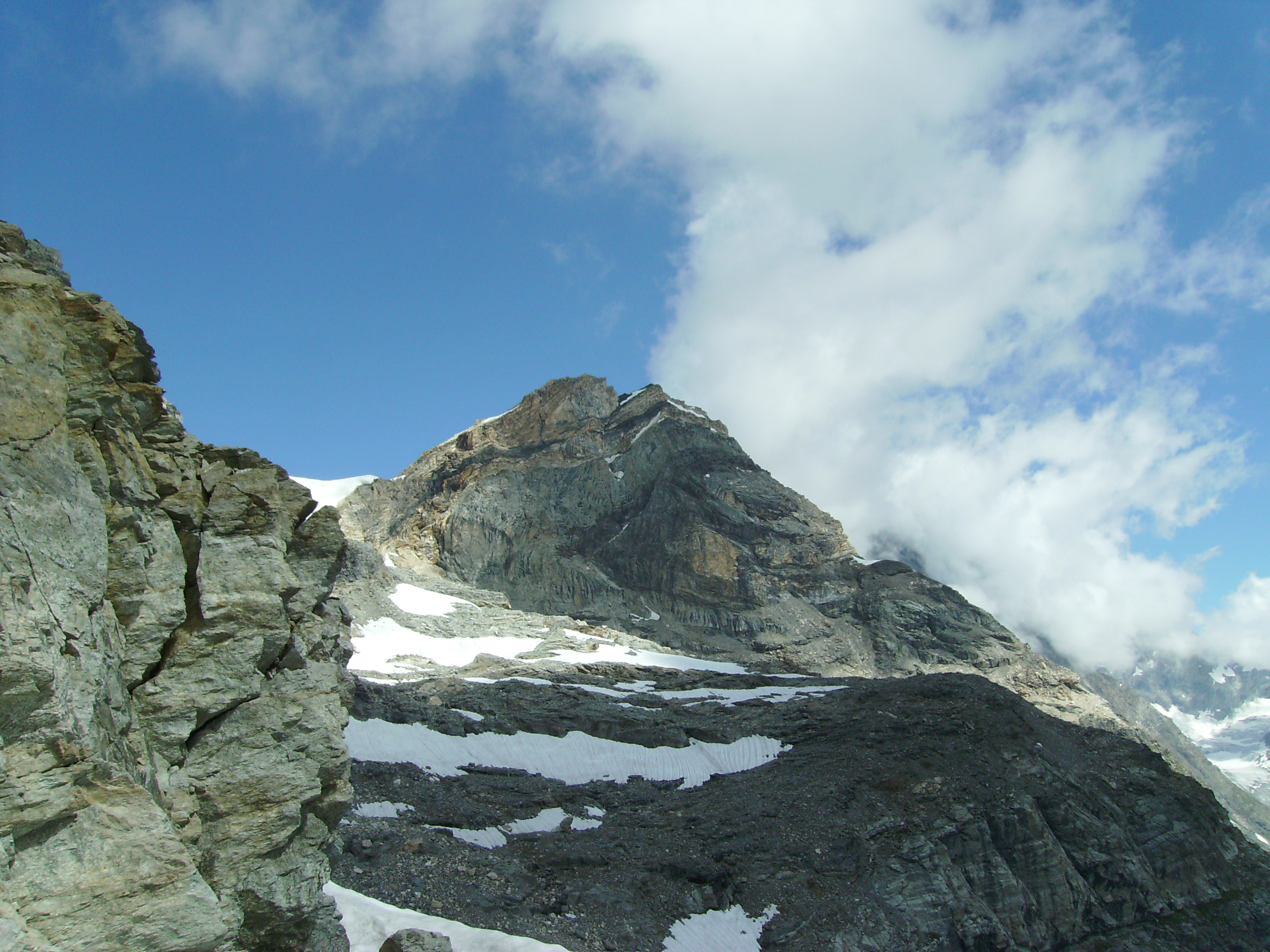 Il Mont Blanc du Creton dal Colle di Vofréde